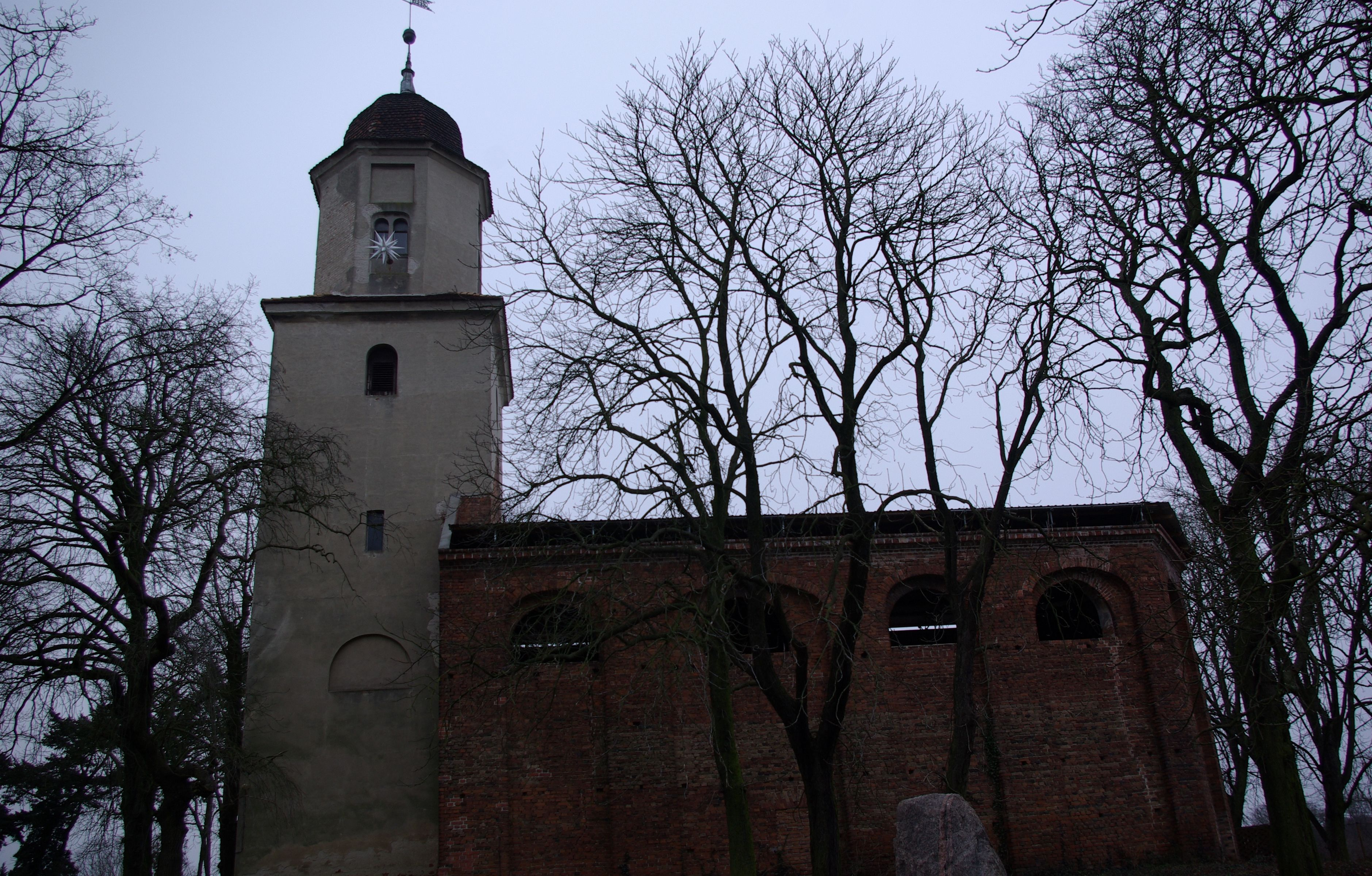 Zeschdorf Ortsteil Hohenjesar in Brandenburg. Die Kirche ist heute eine Ruine und steht unter Denkmalschutz.